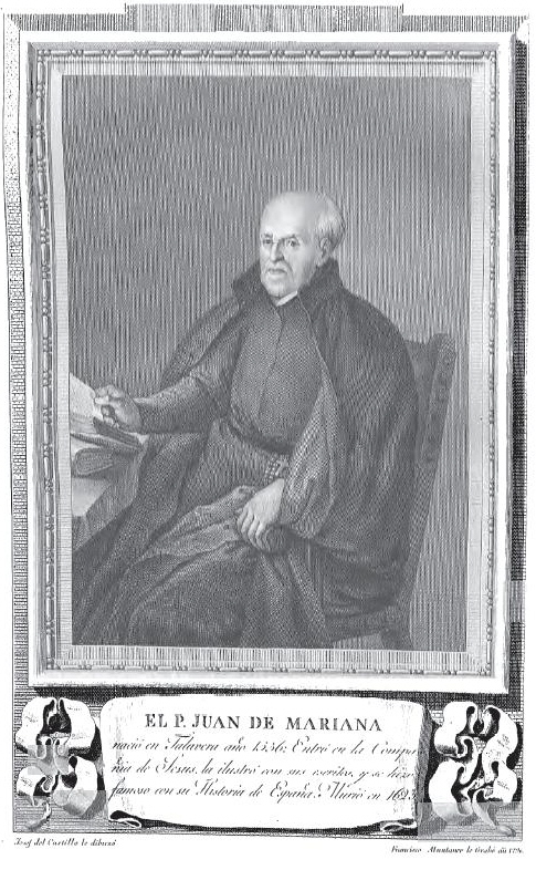 Retrato de Juan de Mariana